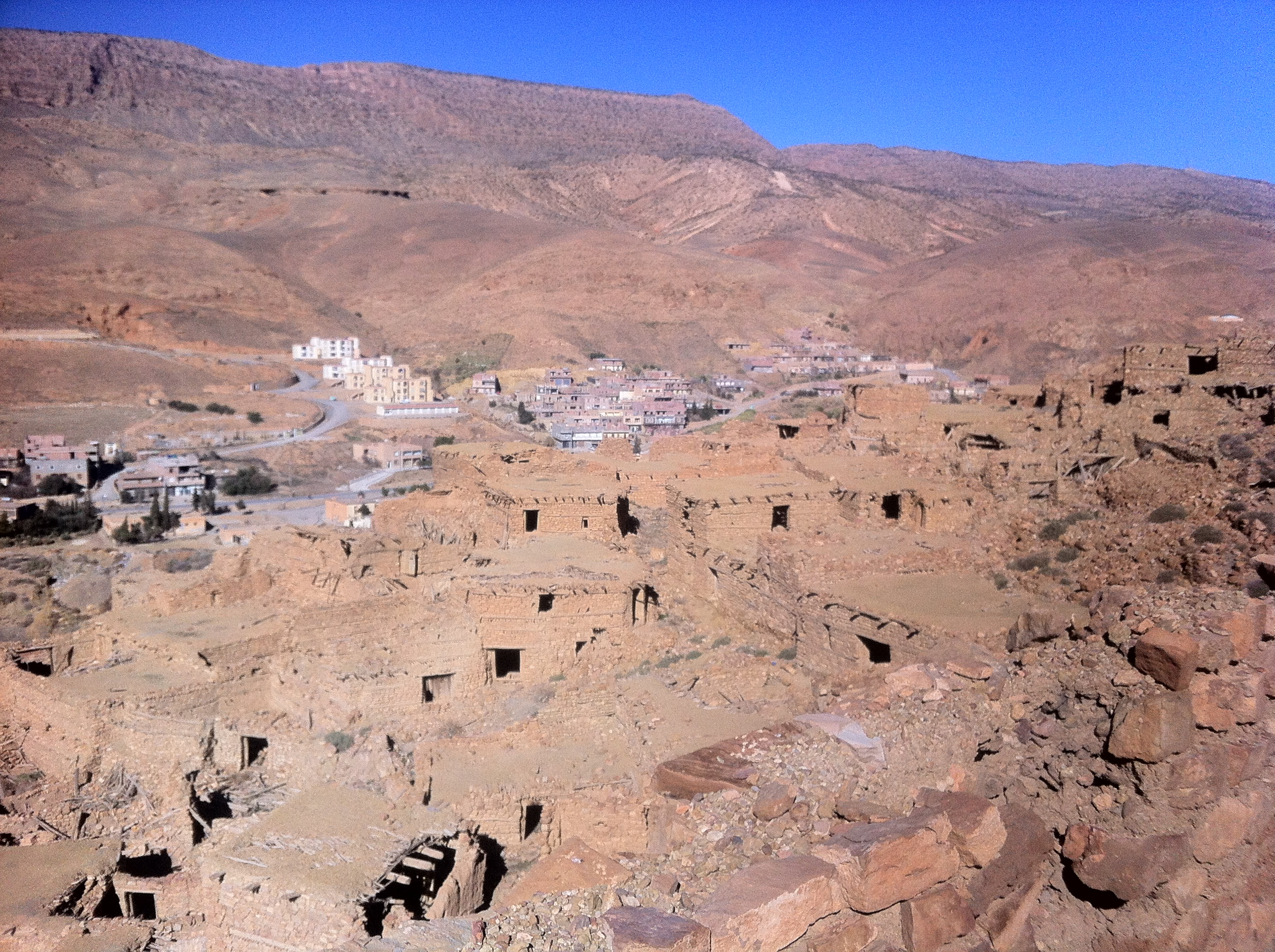 أثار القرية المهجورة منذ 1988